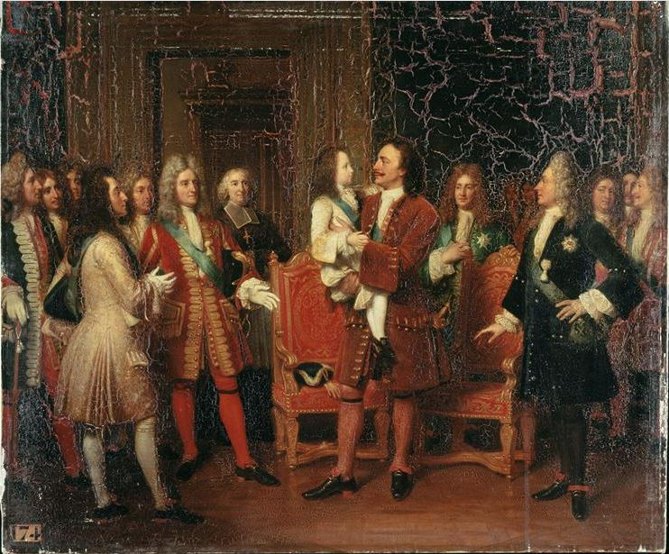 Louis XV enfant visite le Tsar Pierre Ier à l'hôtel de Lesdiguières, le 10 mai 1717 par Louise Marie-Jeanne Hersent (1784-1862) - château de Versailles